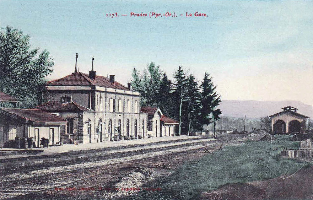 L'intérieur de la gare de Prades, au début des années 1900 avant l'électrification, avec les voies, quais, le bâtiment voyageurs et la remise des locomotives.